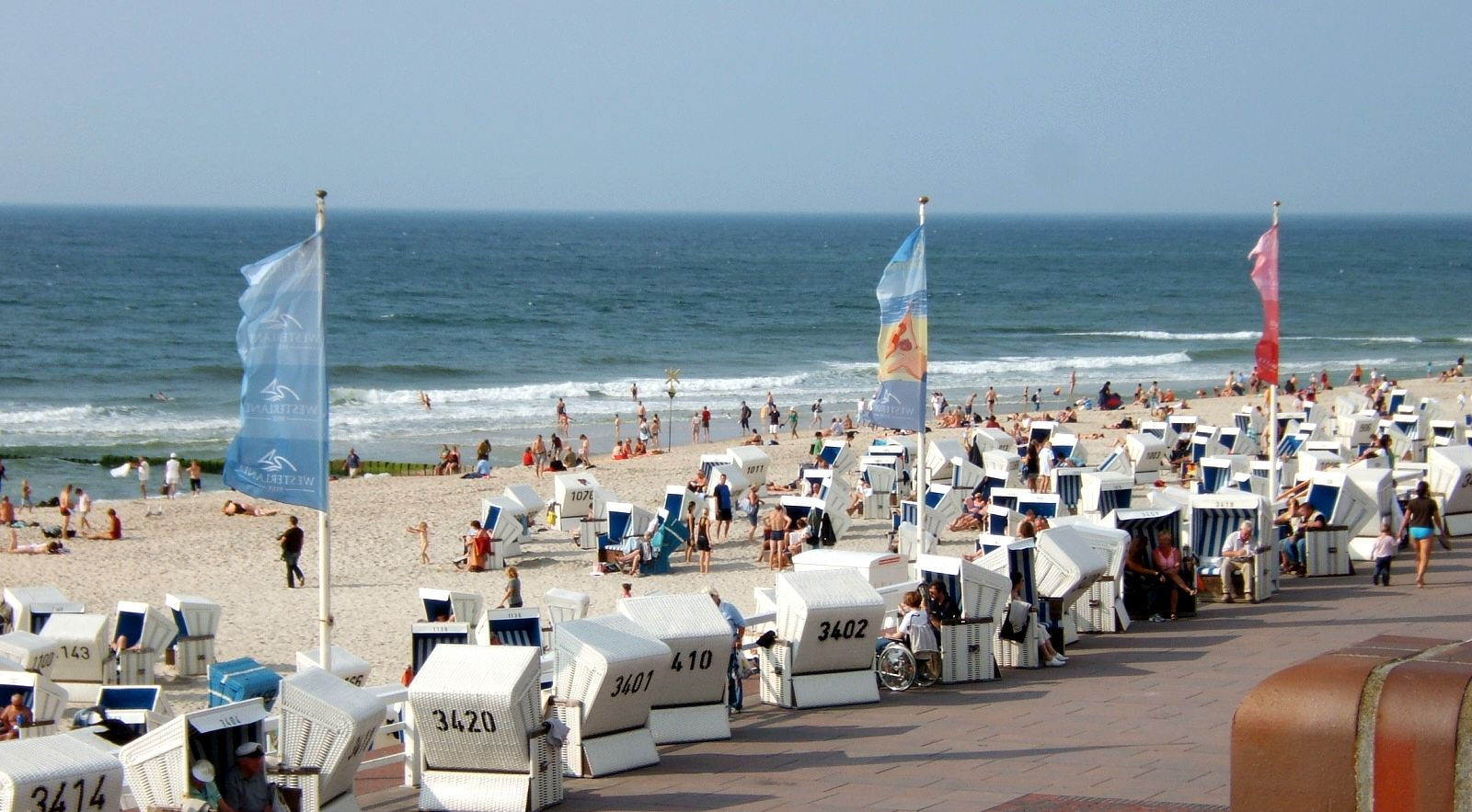 Westerland Beach, Sylt, Germany